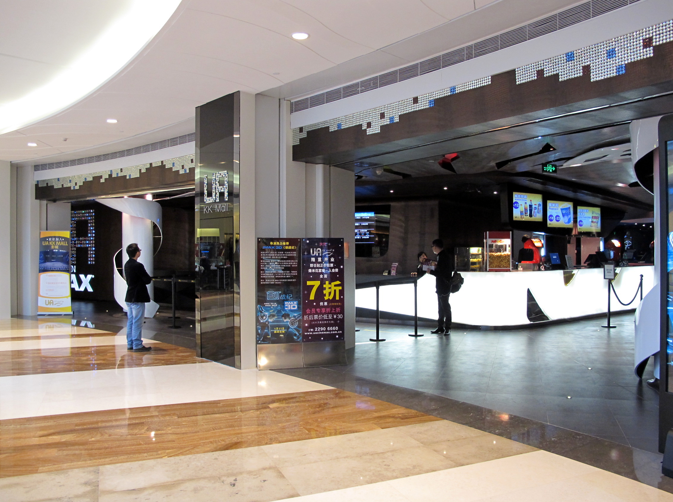 UA Cinema in KK Mall, Shenzhen